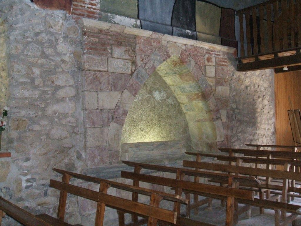 Casteil (Pyrénées-Orientales, France) : église paroissiale Saint-Martin (XVIIème siècle) : mausolée du comte Guifred (XIVème siècle)